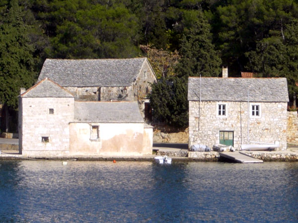 Crkva sv. Jerolima, Stari Grad, Hvar, Croatia